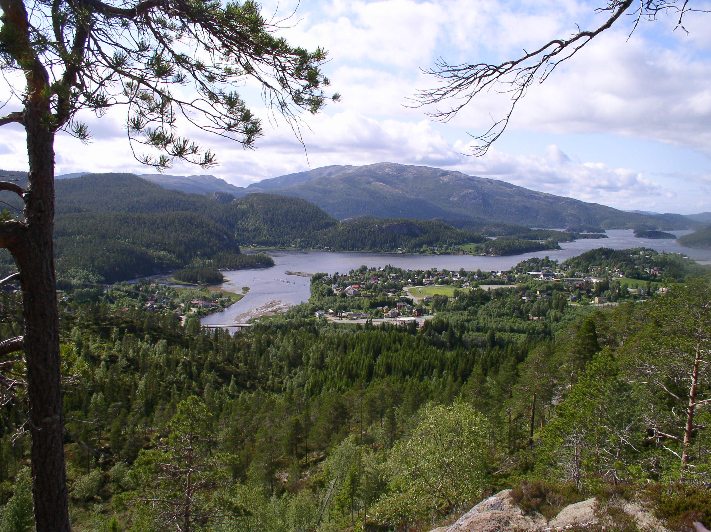 Bildet er av tettstedet Bangsund. Namsos i Nord-Trøndelag i Norge